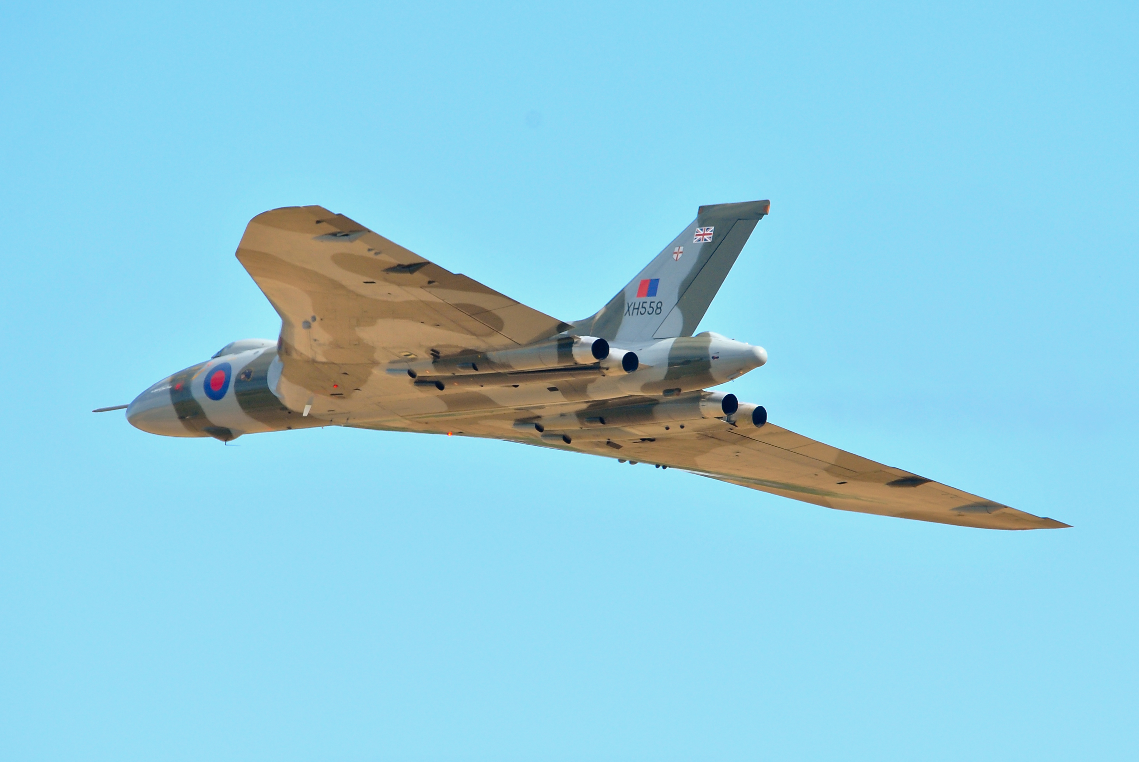 Avro Vulcan XH558